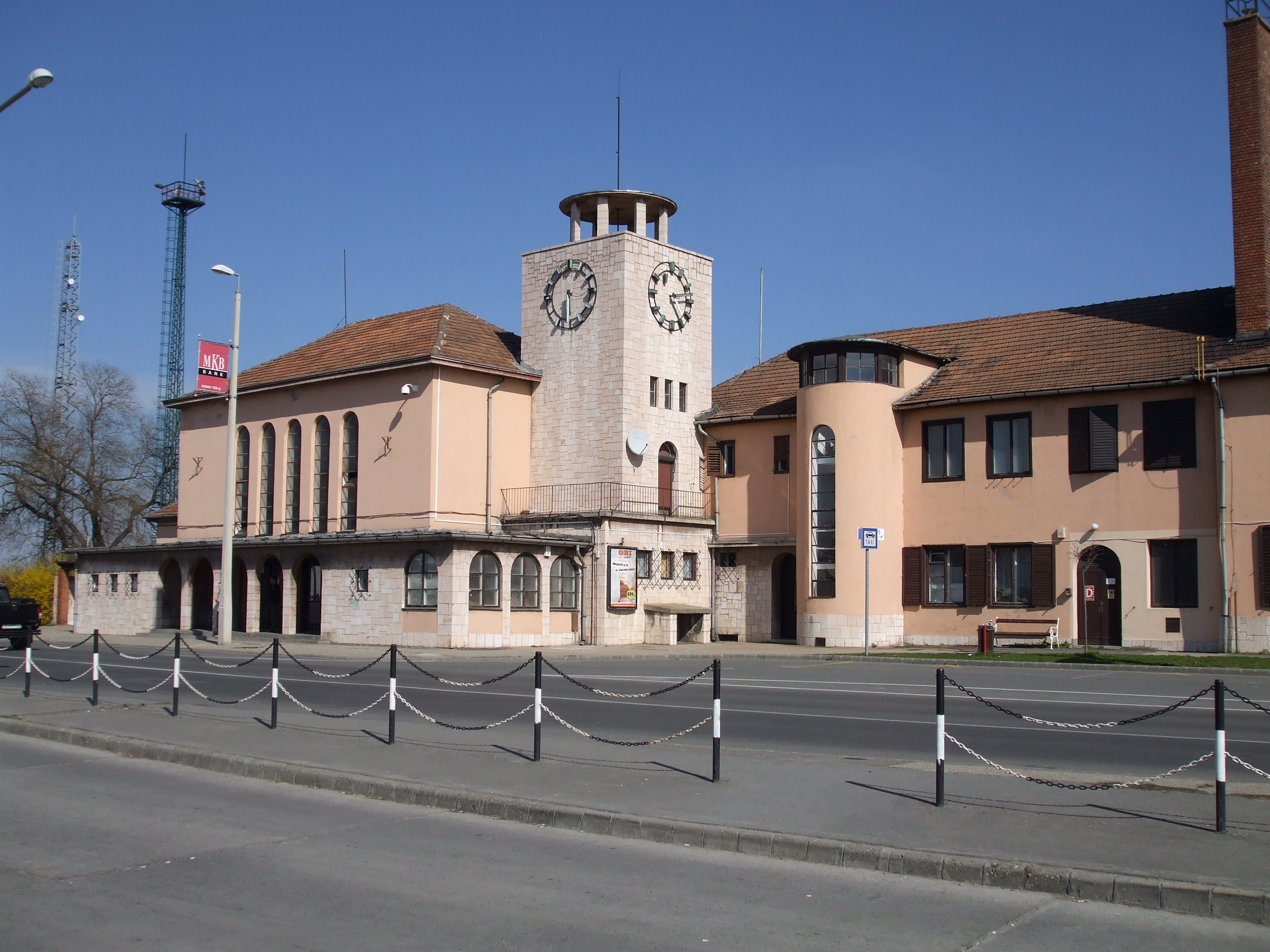 A szekszárdi vasútállomás város felöli oldala.